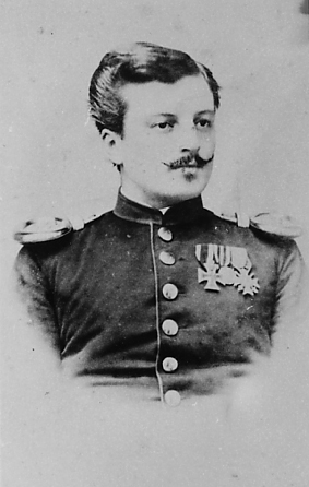 Der spätere Detmolder Bürgermeister Theodor Petri (1846-1903)